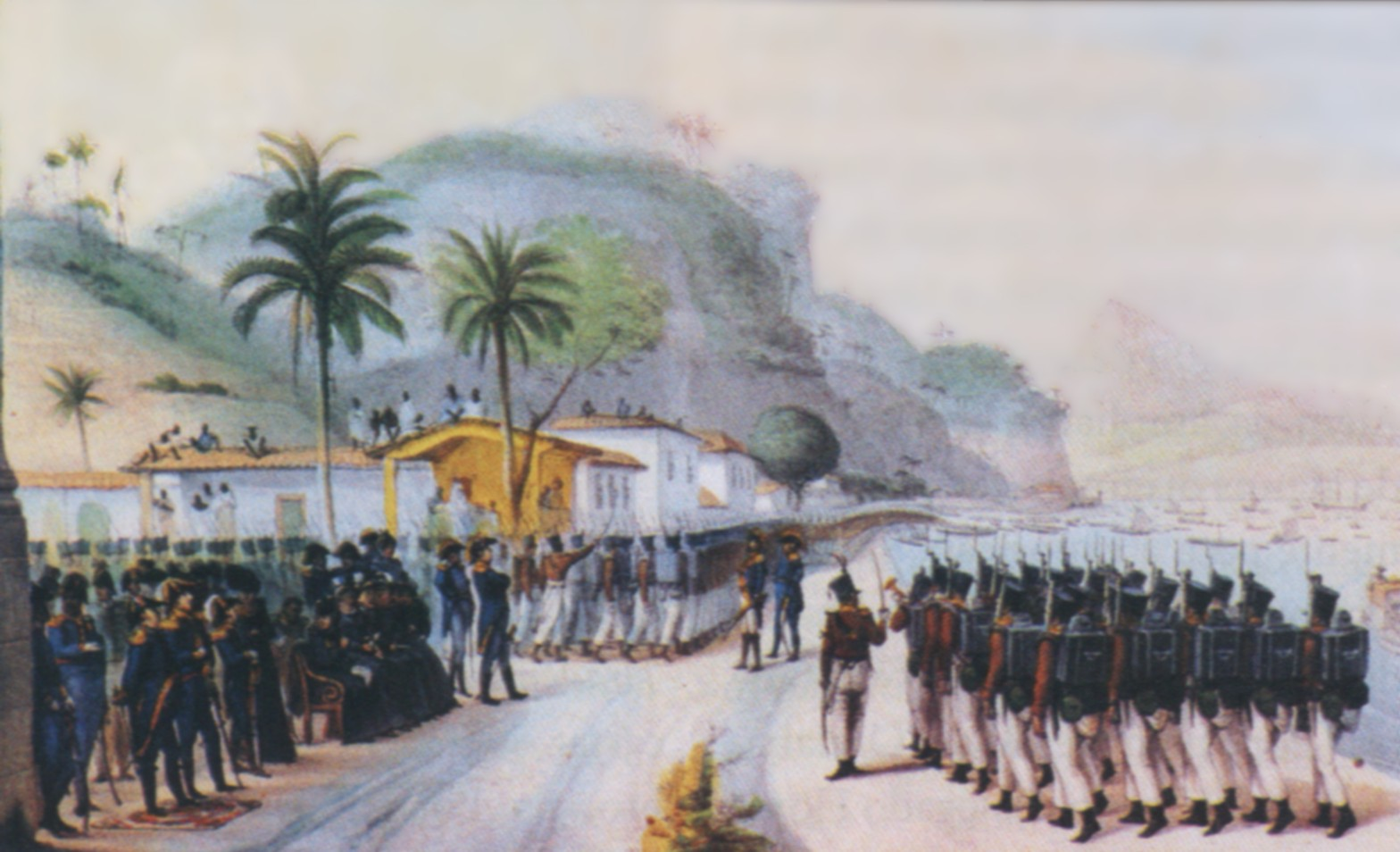 "Revista das Tropas Destinadas a Montevidéu na Praia Grande" - Embarque da Infantaria portuguesa, na Ponta da Areia, Praia Grande, Rio de Janeiro, em 7 de Junho de 1816. (Príncipe D. João, D. Pedro, D. Miguel, Beresford e Lecor) Guerra contra Artigas.